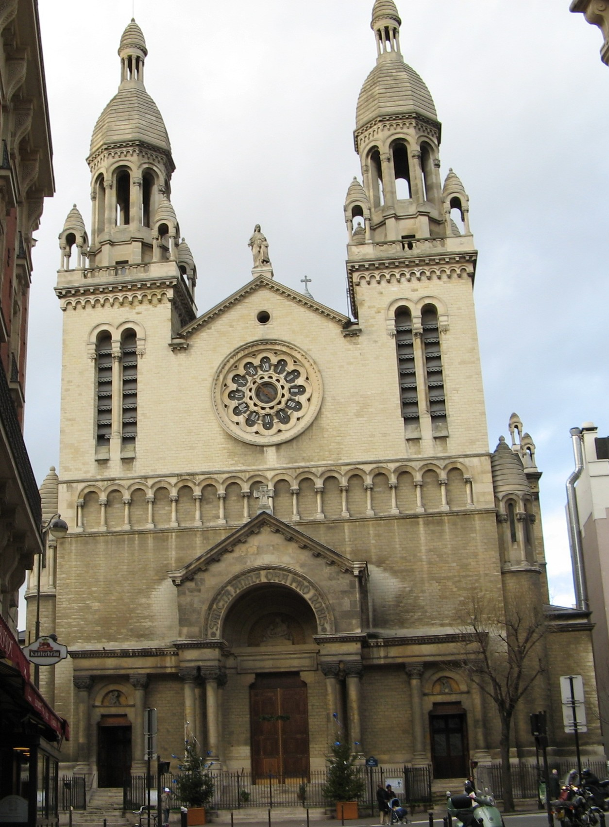 Église Sainte-Anne de la Butte-aux-Cailles, Paris, France.